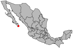 San Jose del Cabo in Messico